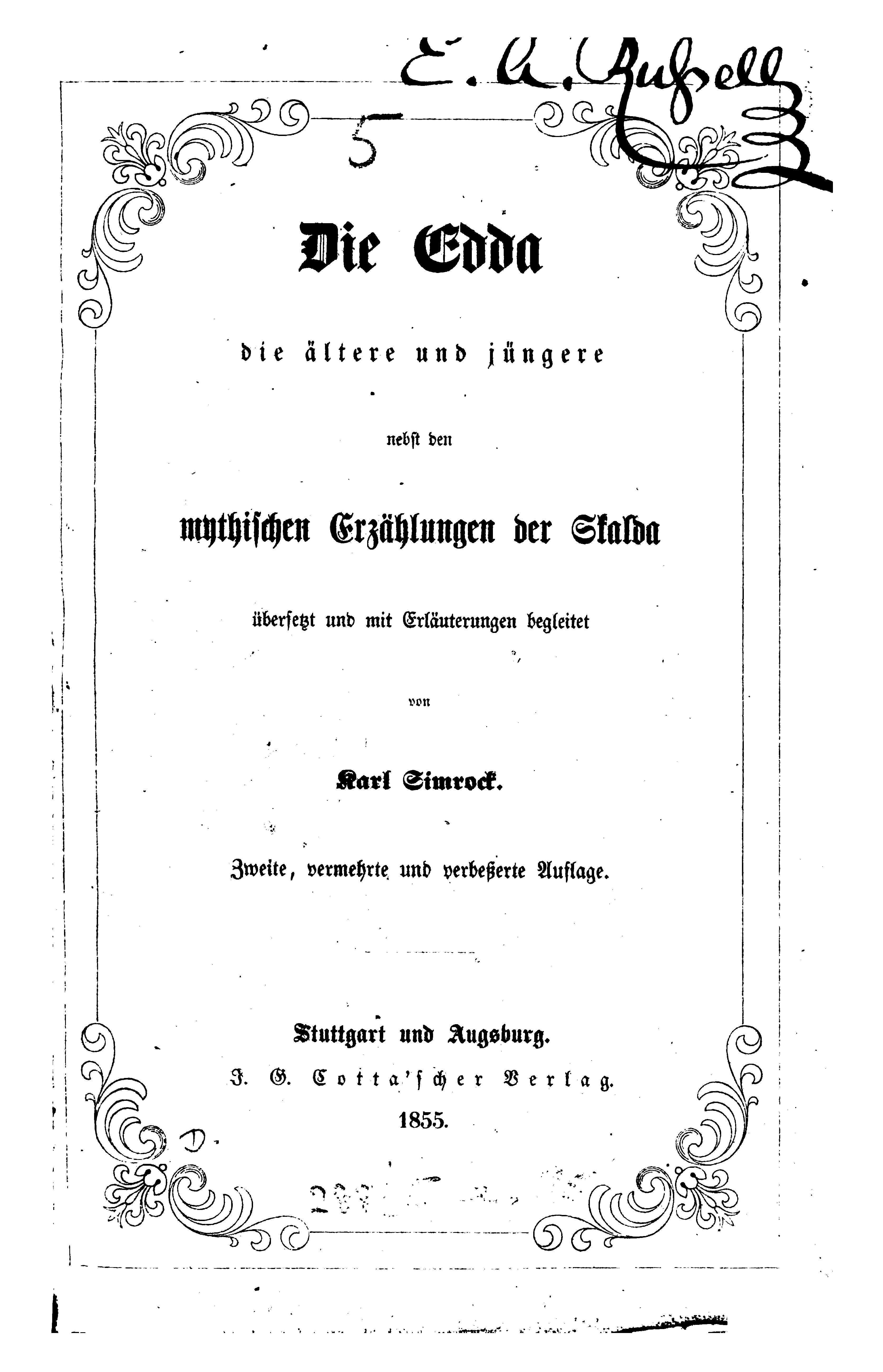 This is a scan of the historical document: Die Edda: Die ältere und jüngere nebst den mythischen Erzählungen der Skalda